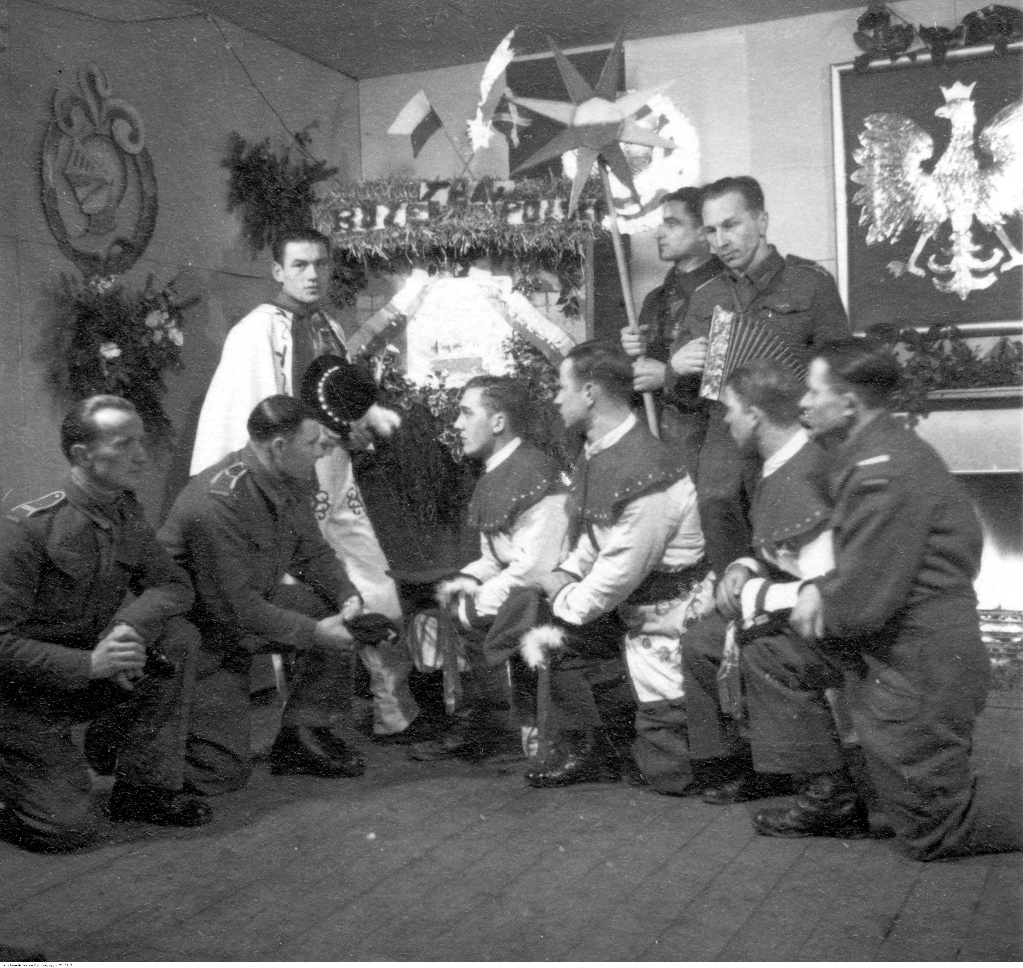 Kolędnicy w świetlicy żołnierskiej. Jeden z żołnierzy gra na harmonii. Na ścianach wiszą znaki pancerne i godło Polski (z prawej).